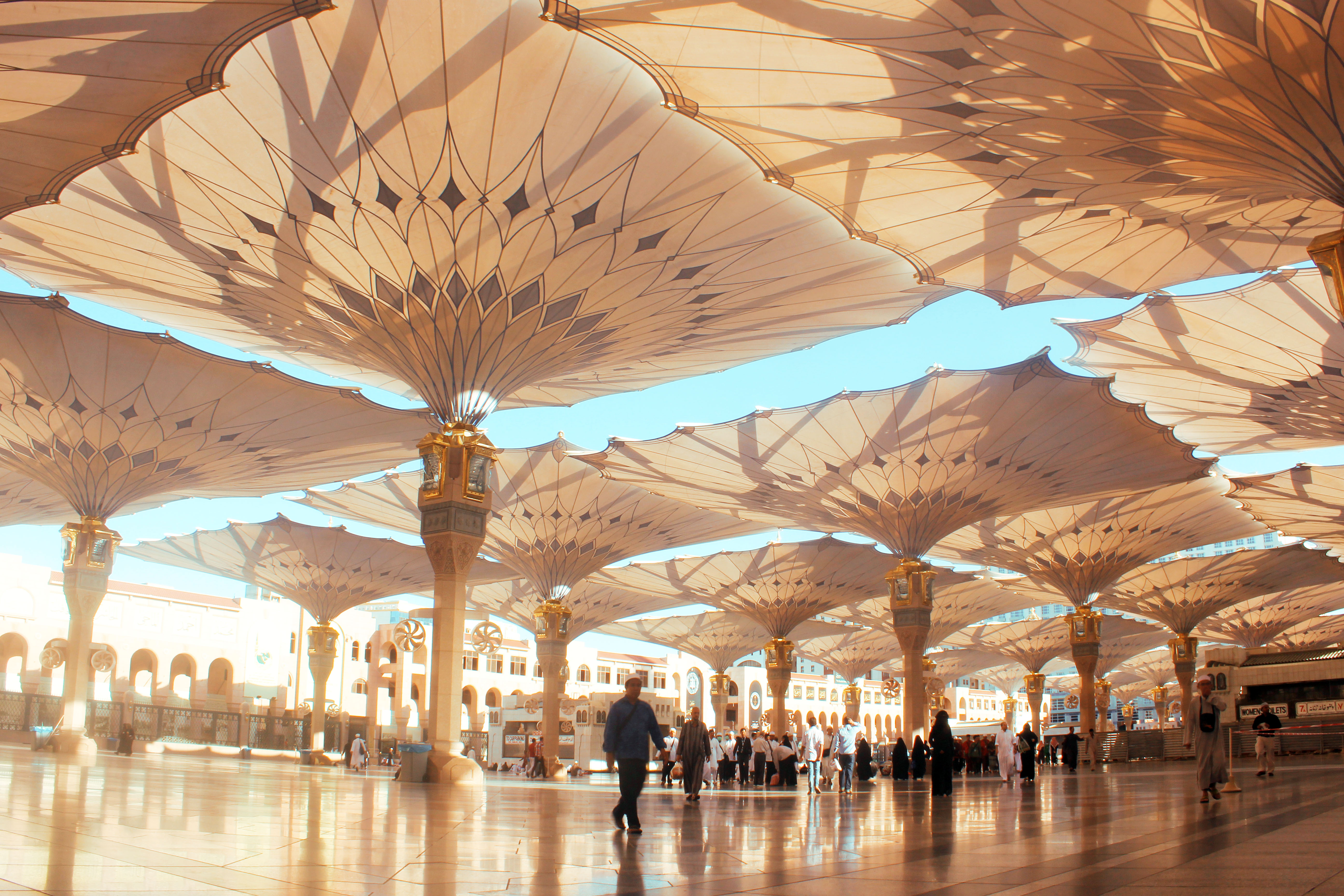 Al-Masjid al-Nabawi, Medina